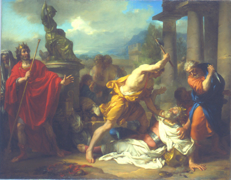 Etienne-Barthélemy Garnier, La mort de Tatius, 1788, Paris, Ecole Nationale Supérieure des Beaux-Arts